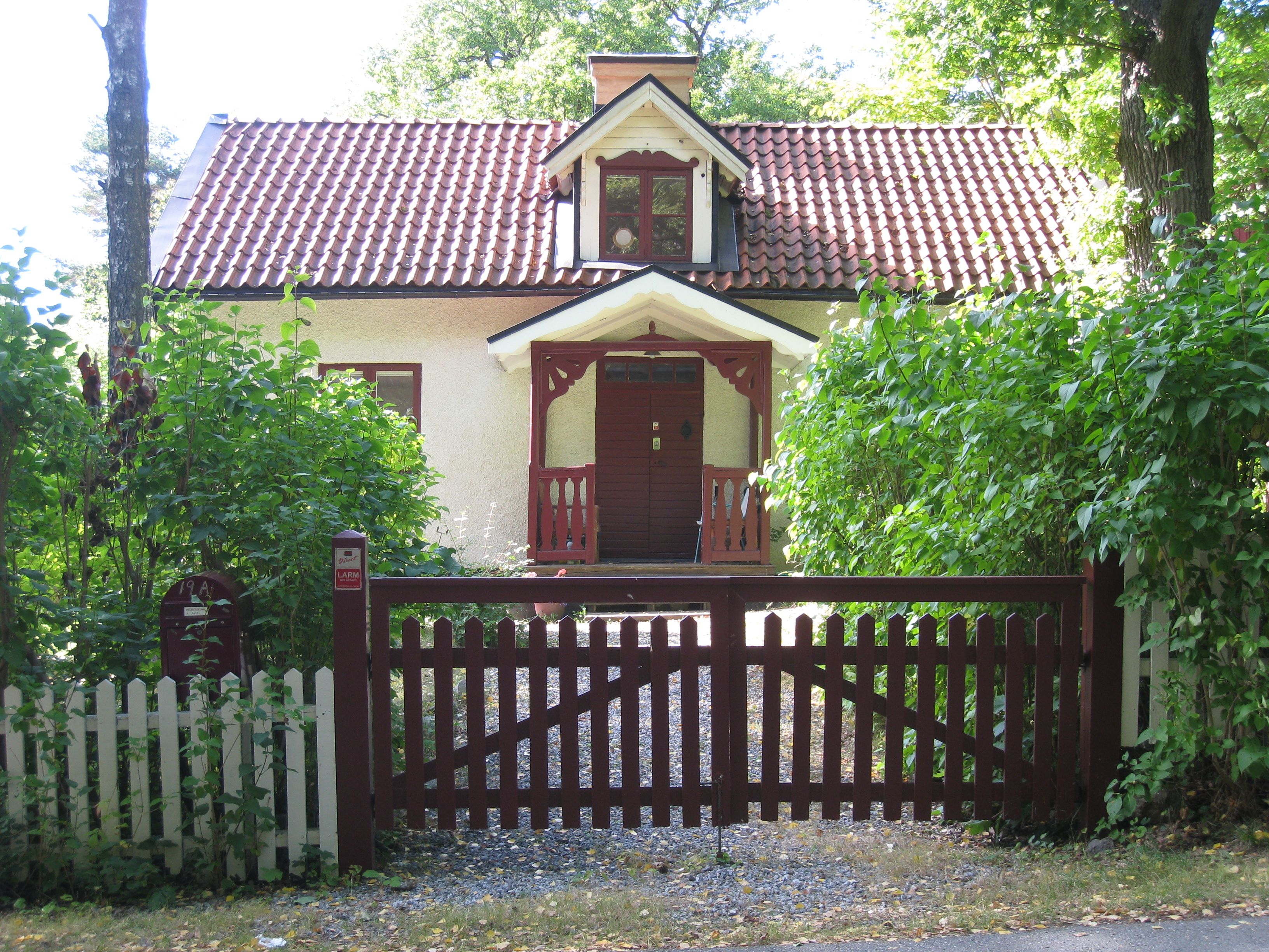 Olovslunds torp, Olovslundsvägen 19A i Olovslund i Bromma, väster om Stockholm. Torpet byggdes 1896 av Johannes Olsson (1855-1925), som var brukare, tidigare snickare och smed på Åkeshovs gård.